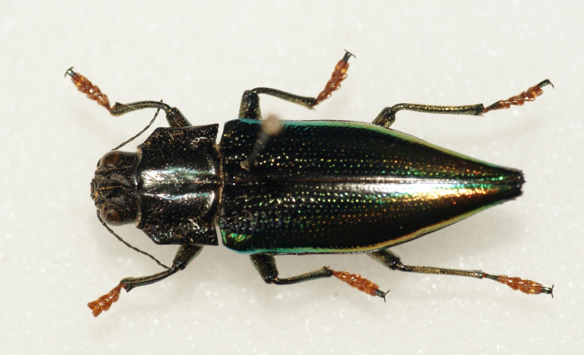 Buprestidae - In collection